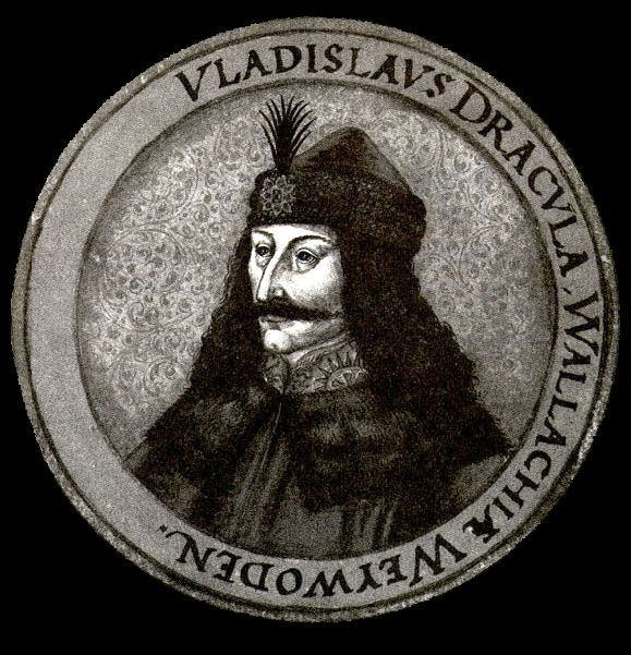 Vladislaus Dracula. Süddeutscher Miniaturmaler, um 1600. Wasserfarben auf Papier; Stammbuch des Nikolaus Ochsenbach, Blatt 74, Württembergische Landesbibliothek Stuttgart.